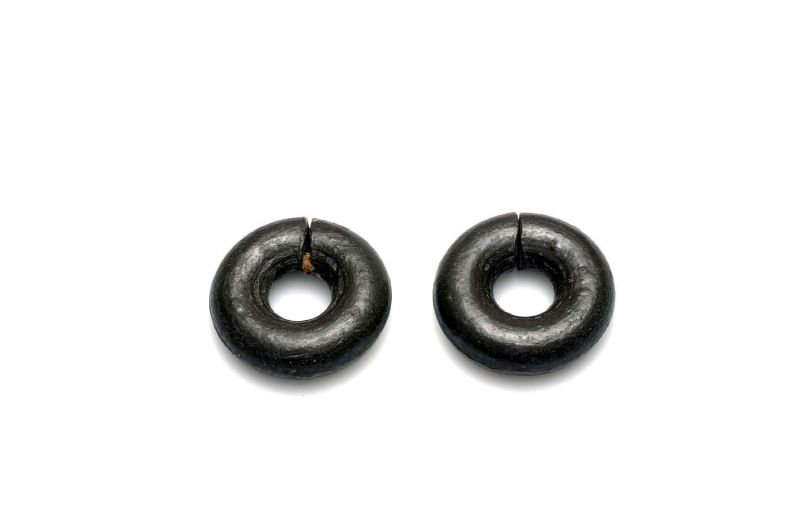 Oorsieraad. Paar tinnen oorringen Unknown language: Isang cemha